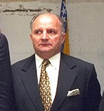 Jakob Finci